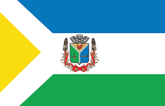 Прапор Приморського району